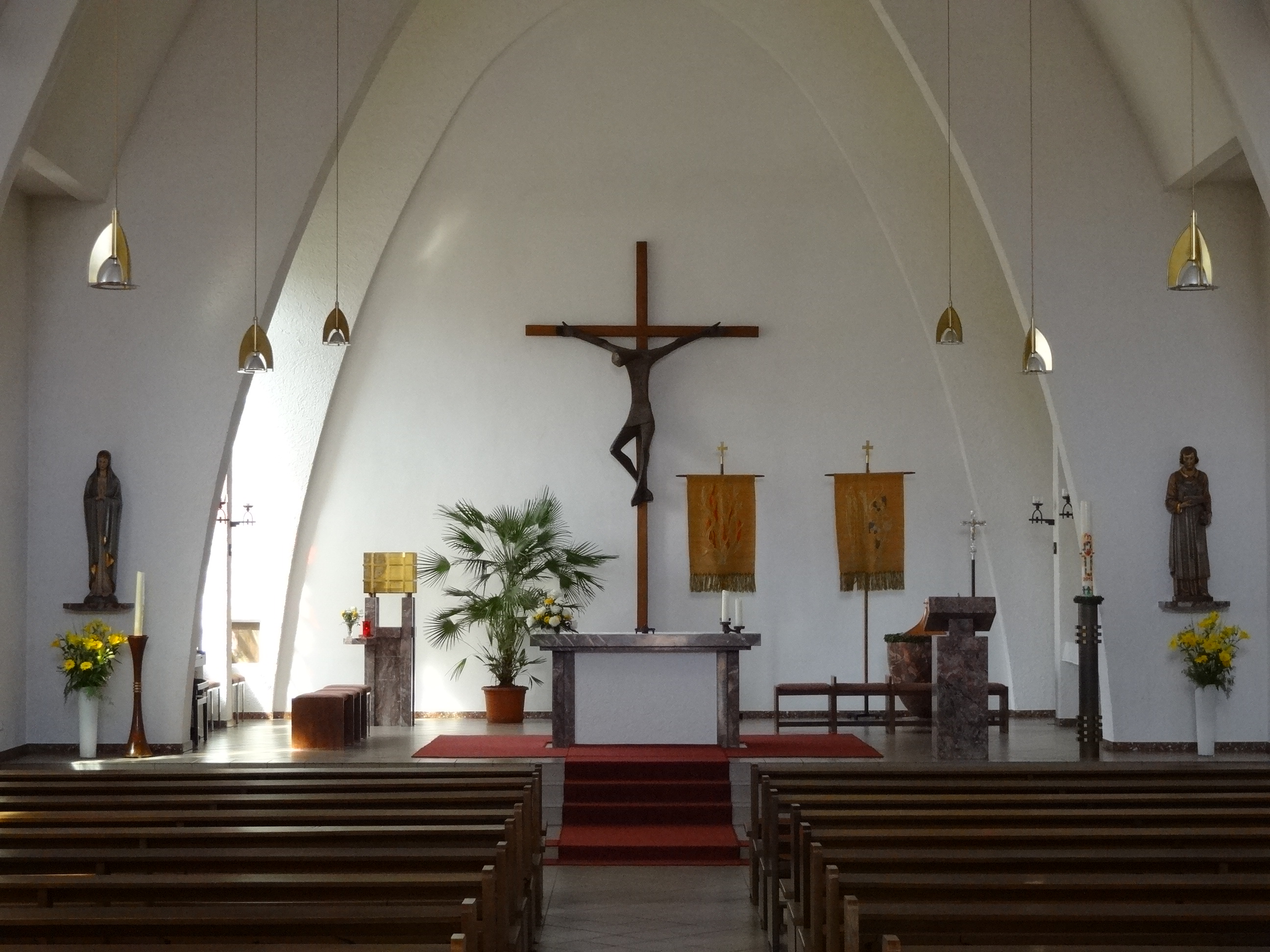 St. Marien (Großen-Buseck)